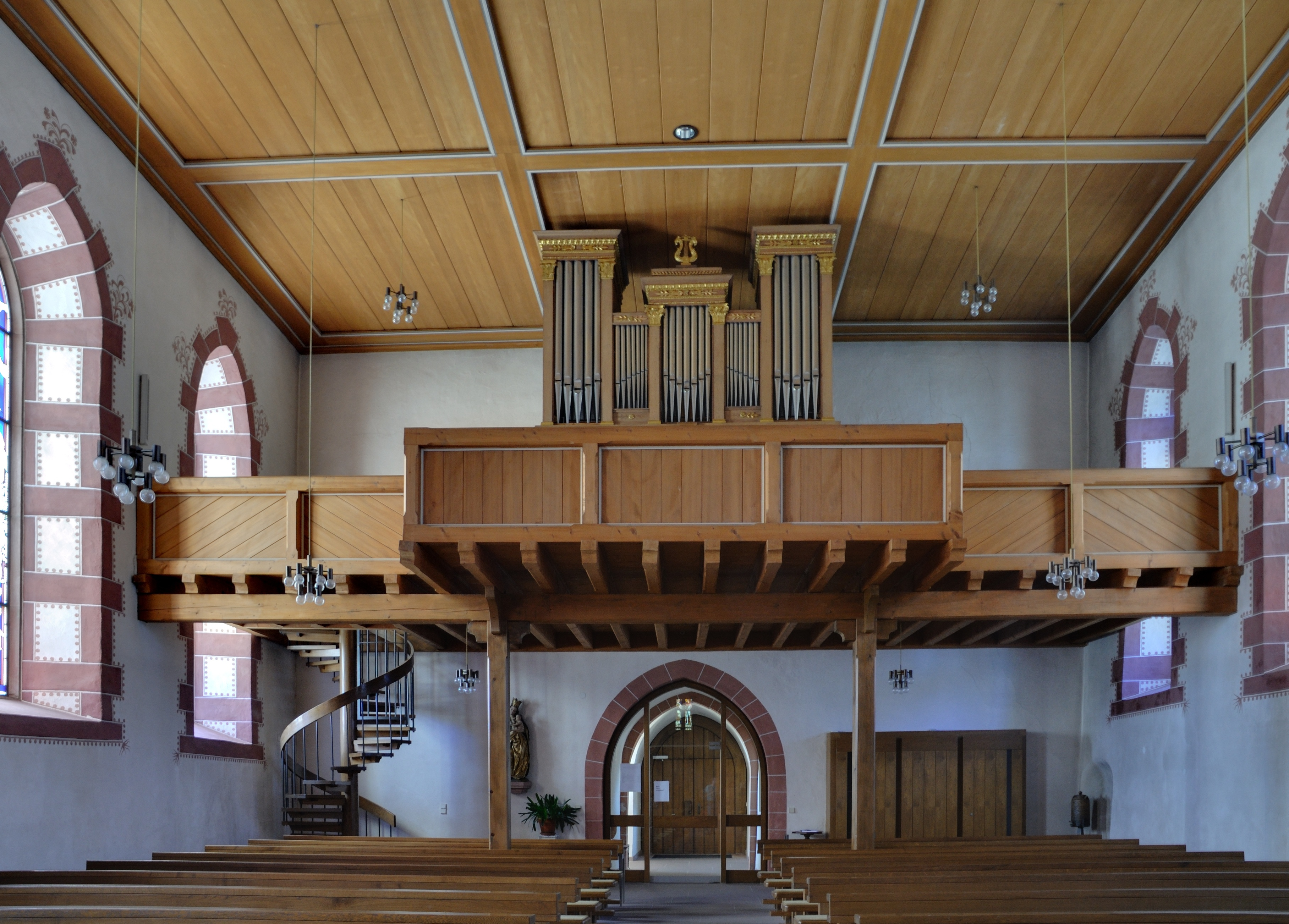 Rheinfelden-Eichsel: Orgelempore der Galluskirche